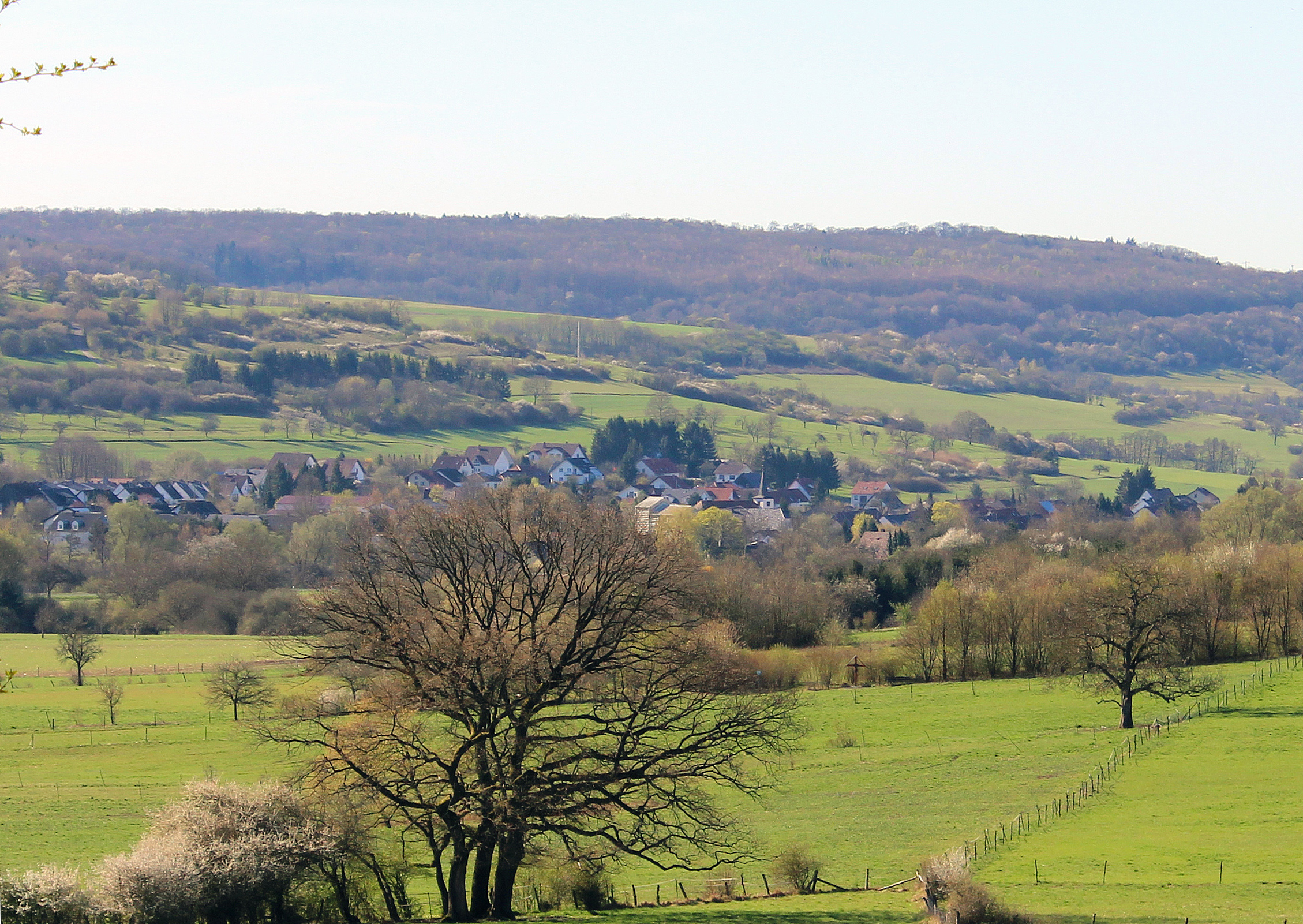 Ansicht von Wittersheim, Gemeinde Mandelbachtal, Saarpfalz-Kreis, Saarland